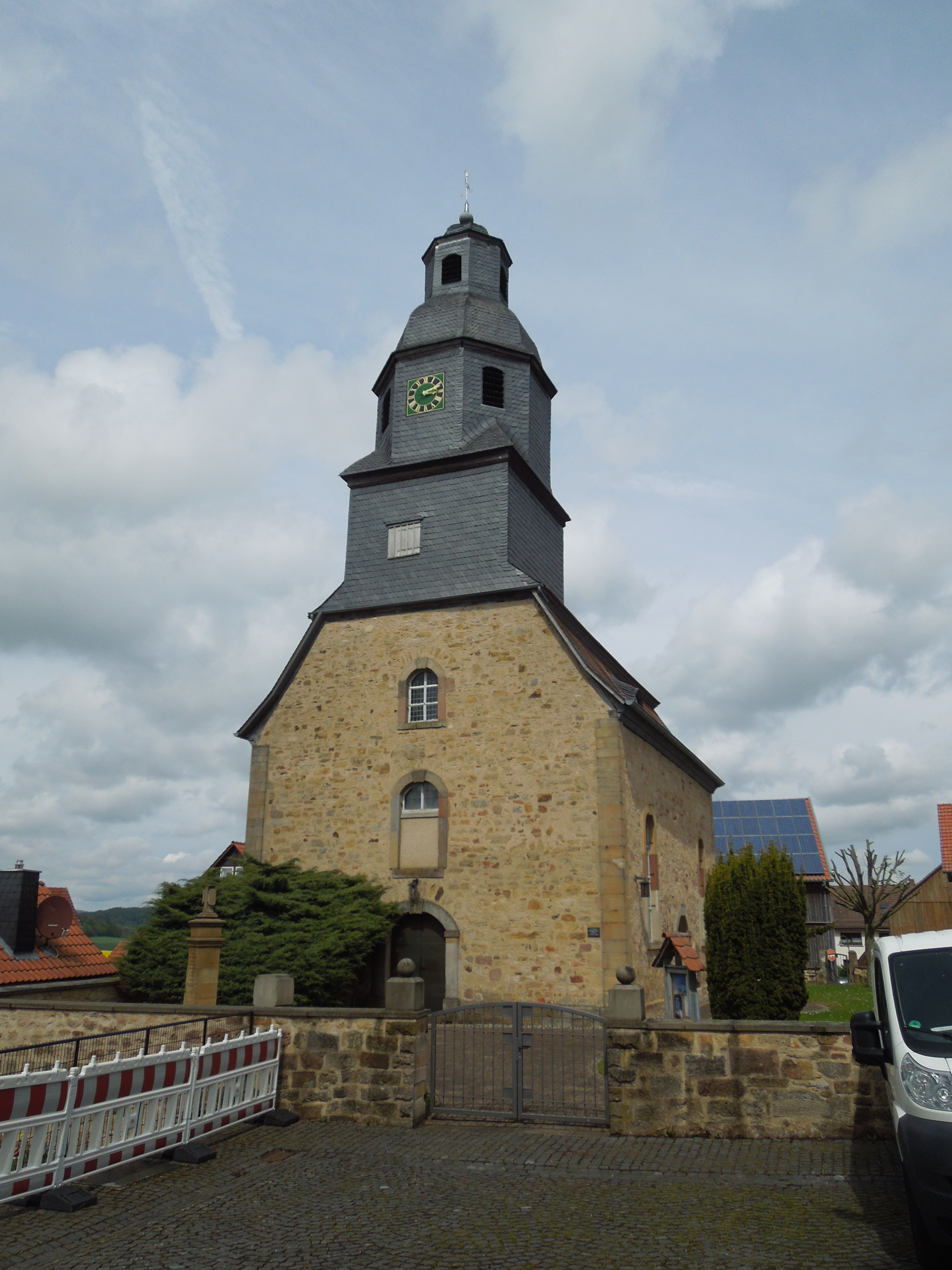 Die ev. Dorfkirche in Sebbeterode; erbaut 1735-1740